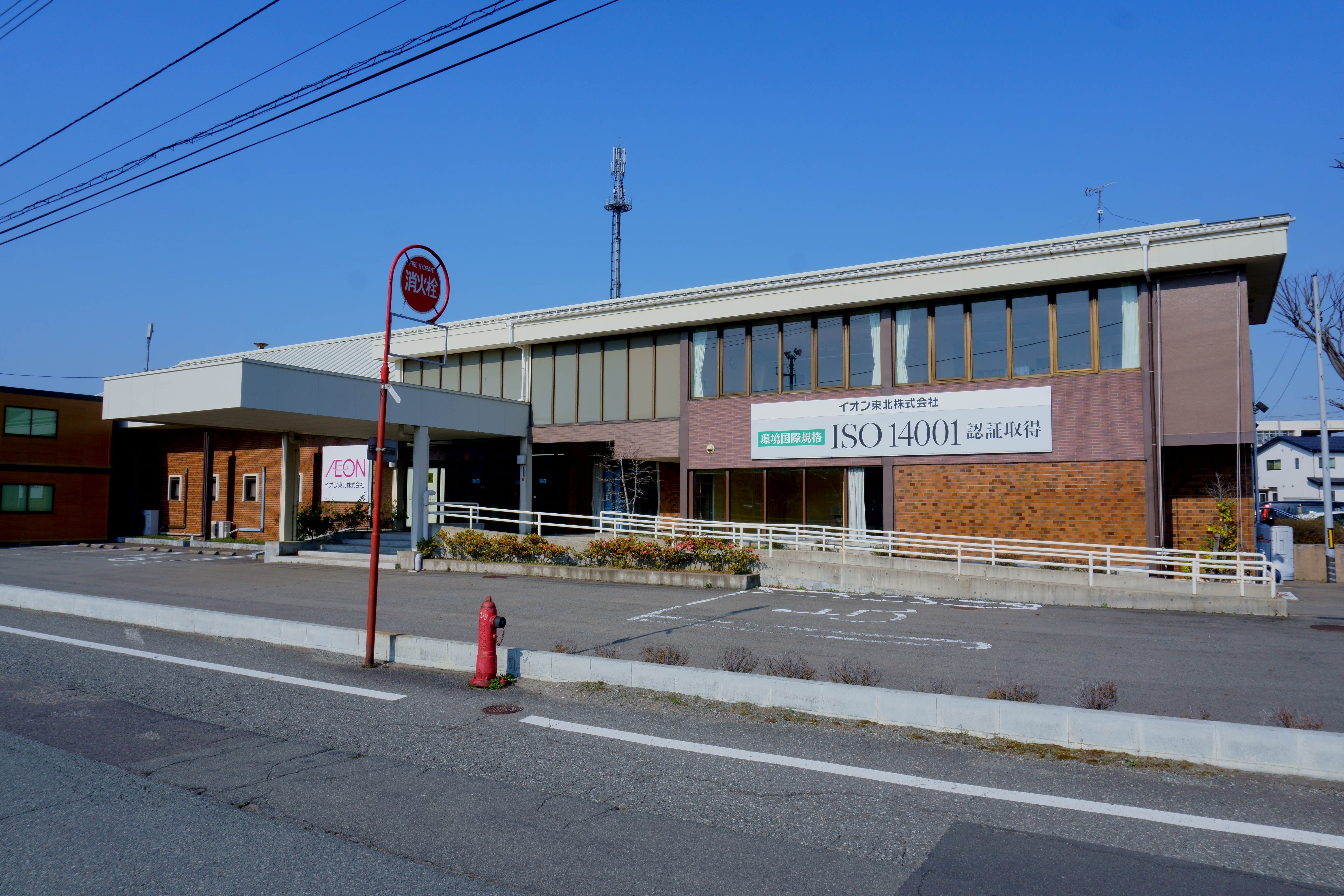 イオン東北株式会社本社（秋田県秋田市）。イオン傘下のマックスバリュ東北（秋田市）とイオンリテール東北カンパニー（仙台市）のグループ2社が2020年3月に統合、本社は秋田市にあるマックスバリュ東北を承継した。